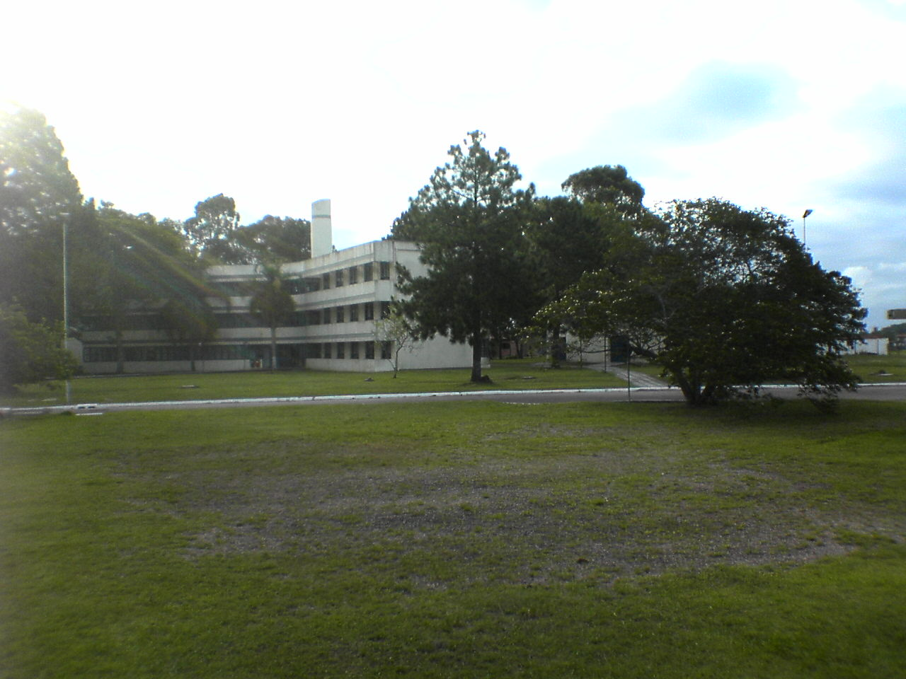 Prédio do Centro Social e de Treinamento do Banrisul, no bairro Ponta Grossa, em Porto Alegre, RS.